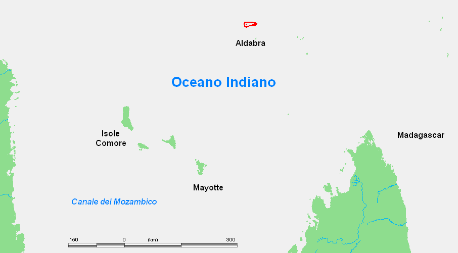 Posizione dell'isola di Aldabra nell'Oceano Indiano